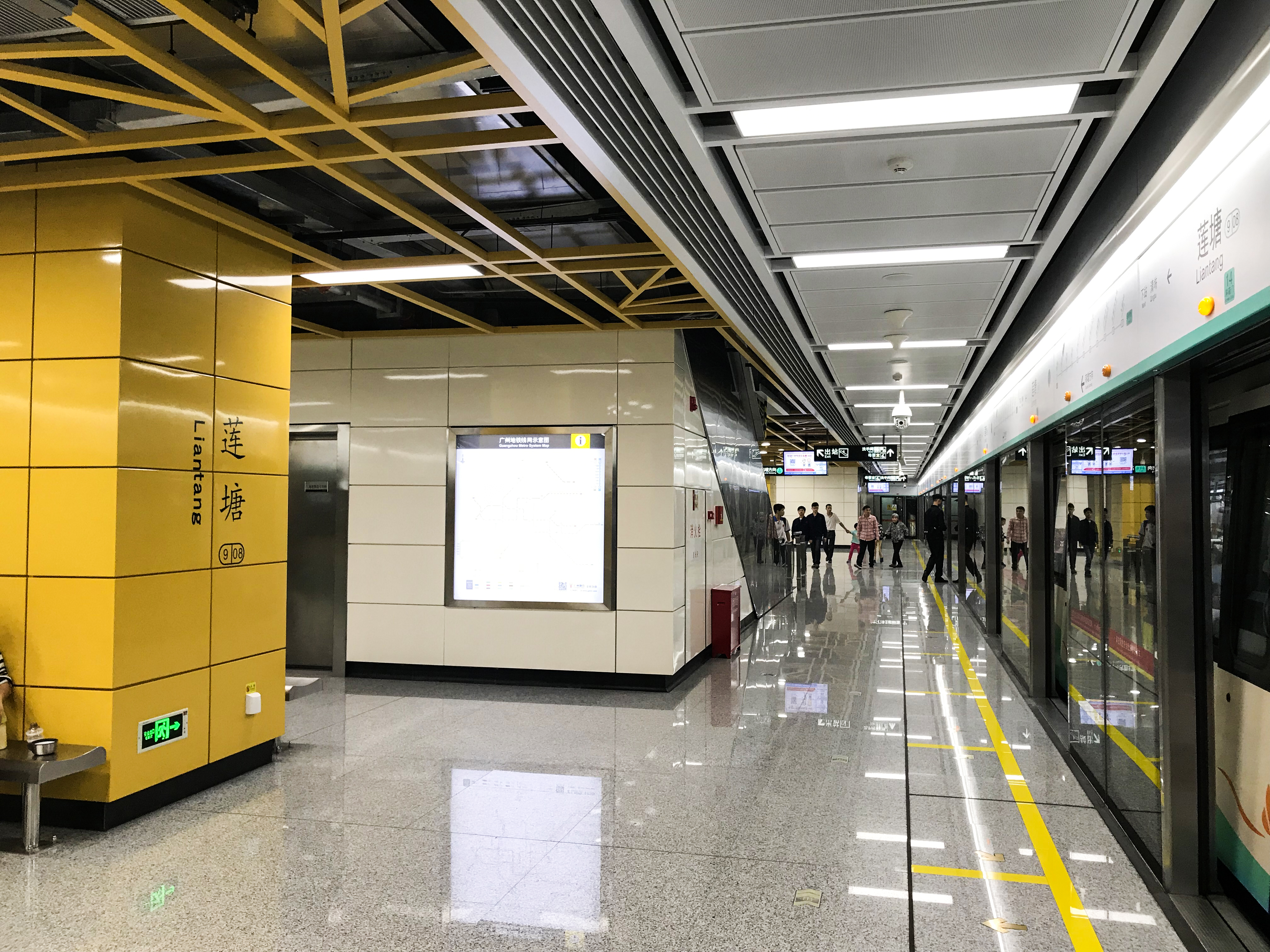 广州地铁莲塘站